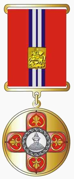 Медаль ордена Ивана Калиты (Московская область)